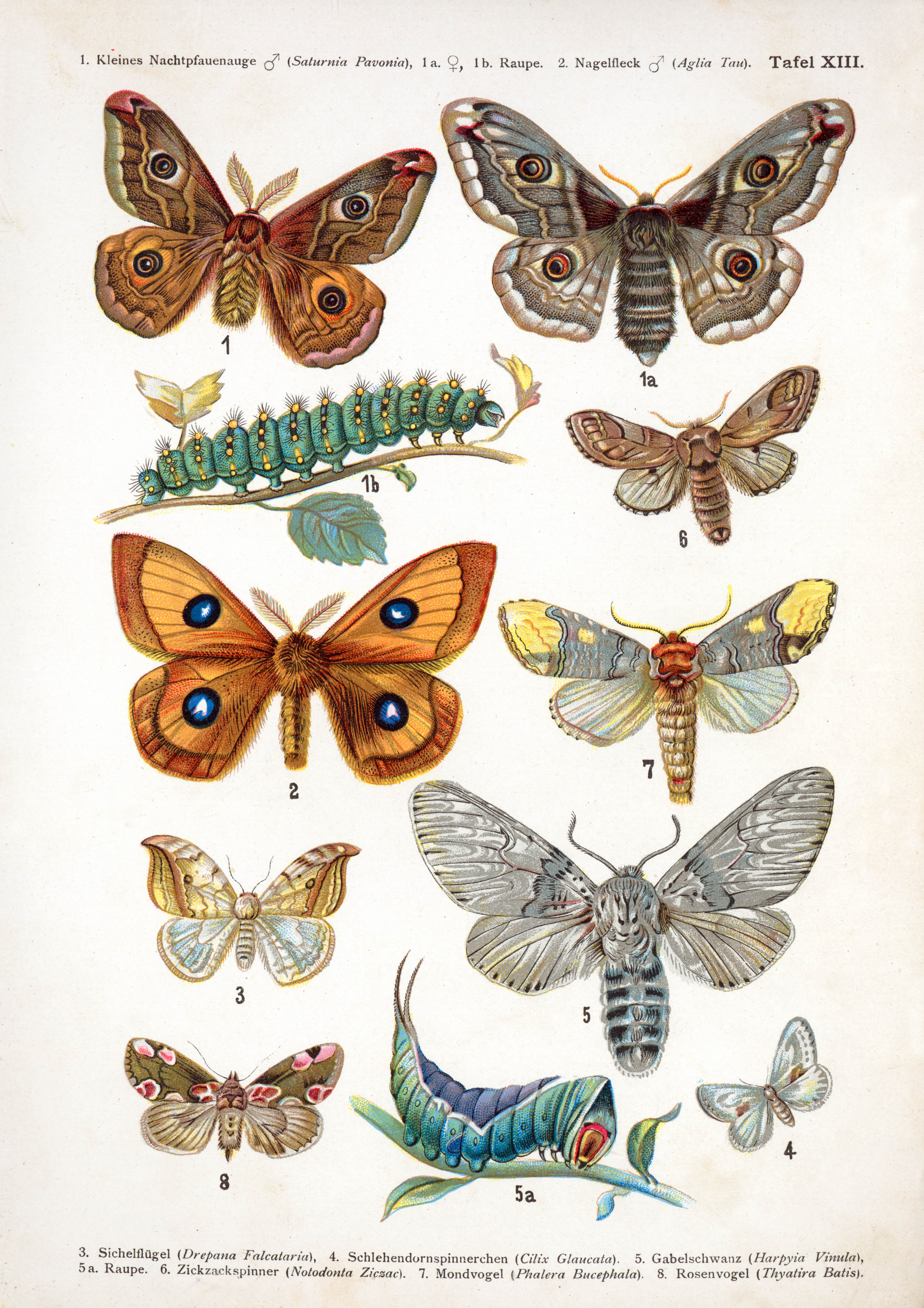 Plate XIII from Europas bekannteste Schmetterlinge. Beschreibung der wichtigsten Arten und Anleitung zur Kenntnis und zum Sammeln der Schmetterlinge und Raupen (ca. 1895), F. Nemos, Oestergaard Verlag, Berlin, 18 chromolithographische Tafeln, 160 pp.